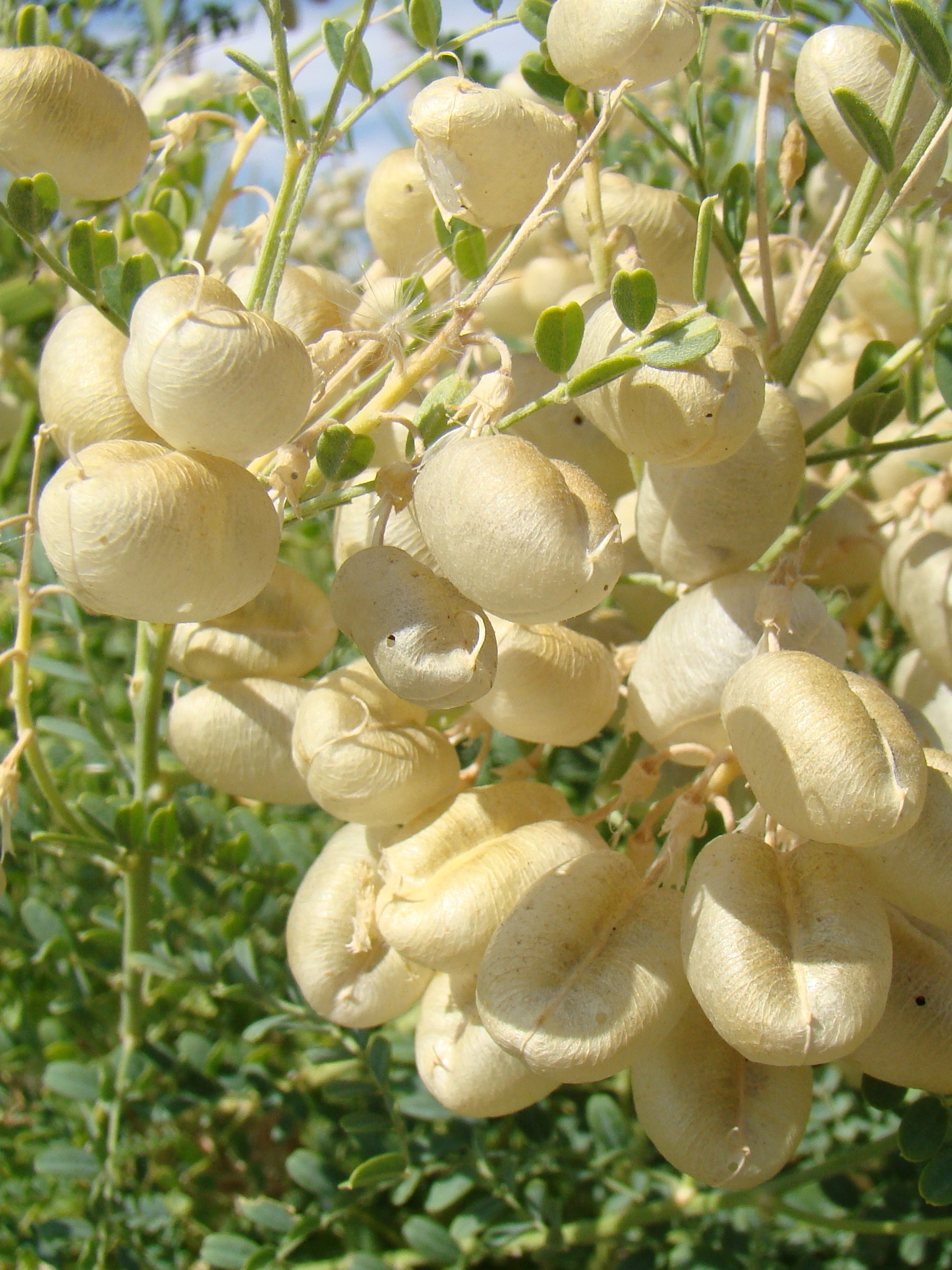 Сферофиза солонцовая (Sphaerophysa salsula). Созревшие бобы. Город Байконур, Казахстан.